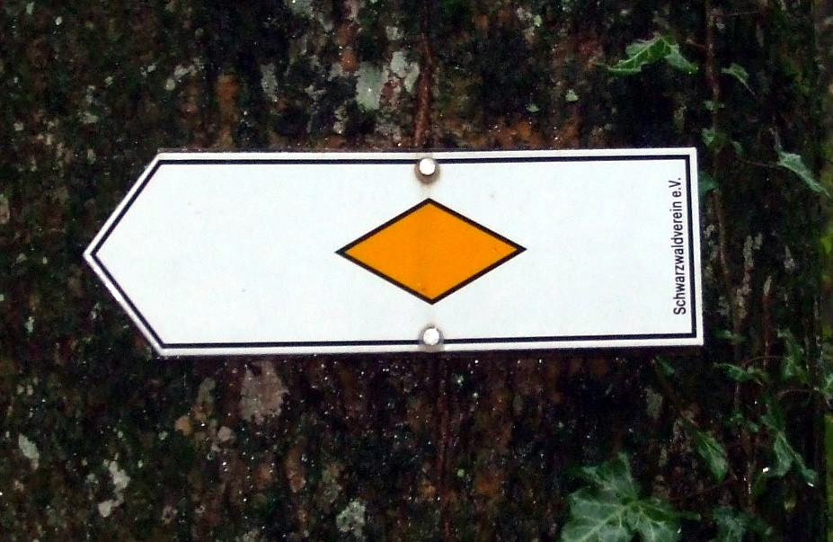 Schwarzwaldverein (Black Forest Society) trail marker between Kandern and Riedlingen